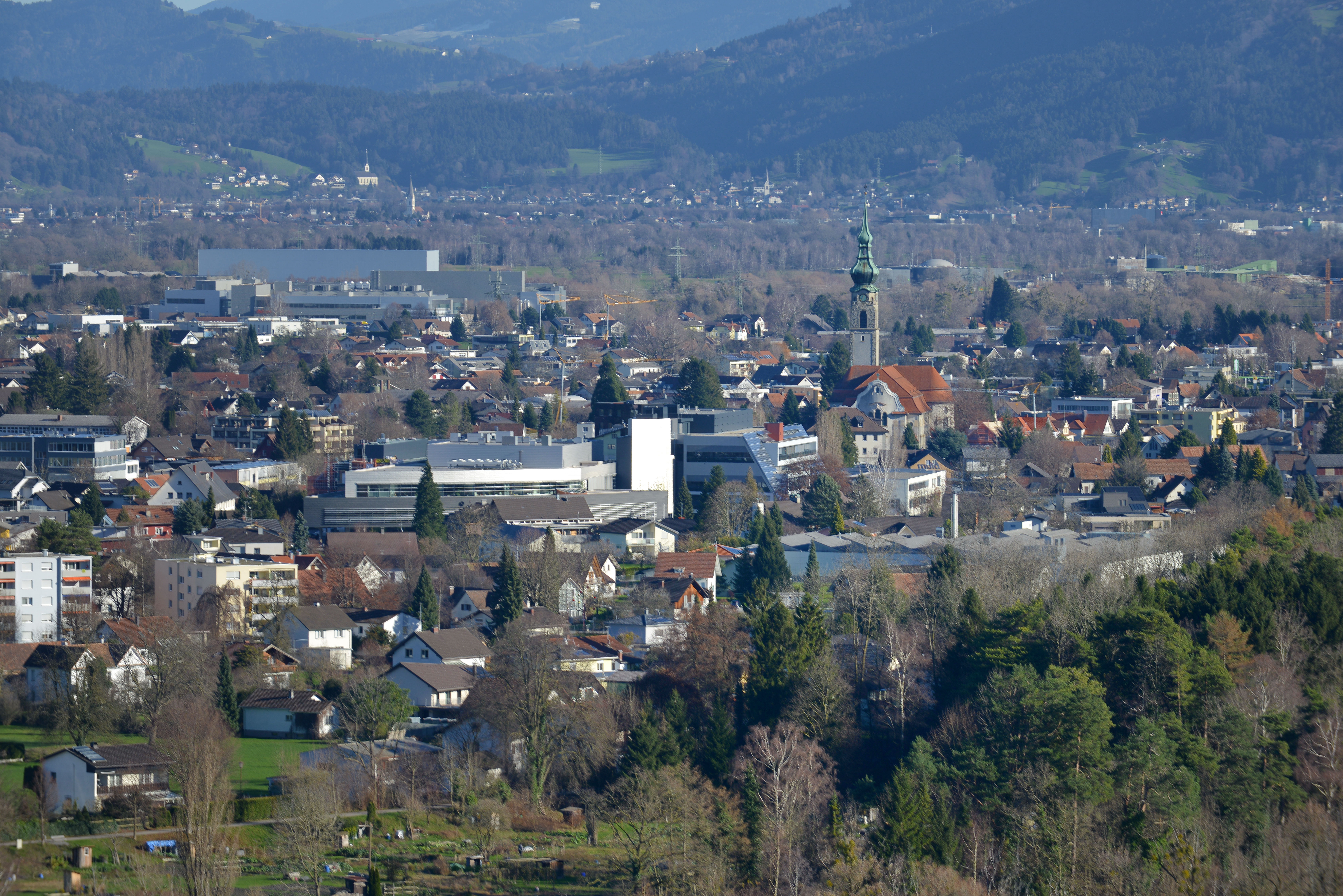 Ortsbild von Höchst (Vorarlberg). Im Bild vor und hinter der Pfarrkirche die Werke 1,2,(5 Fußach) von Julius Blum GmbH.